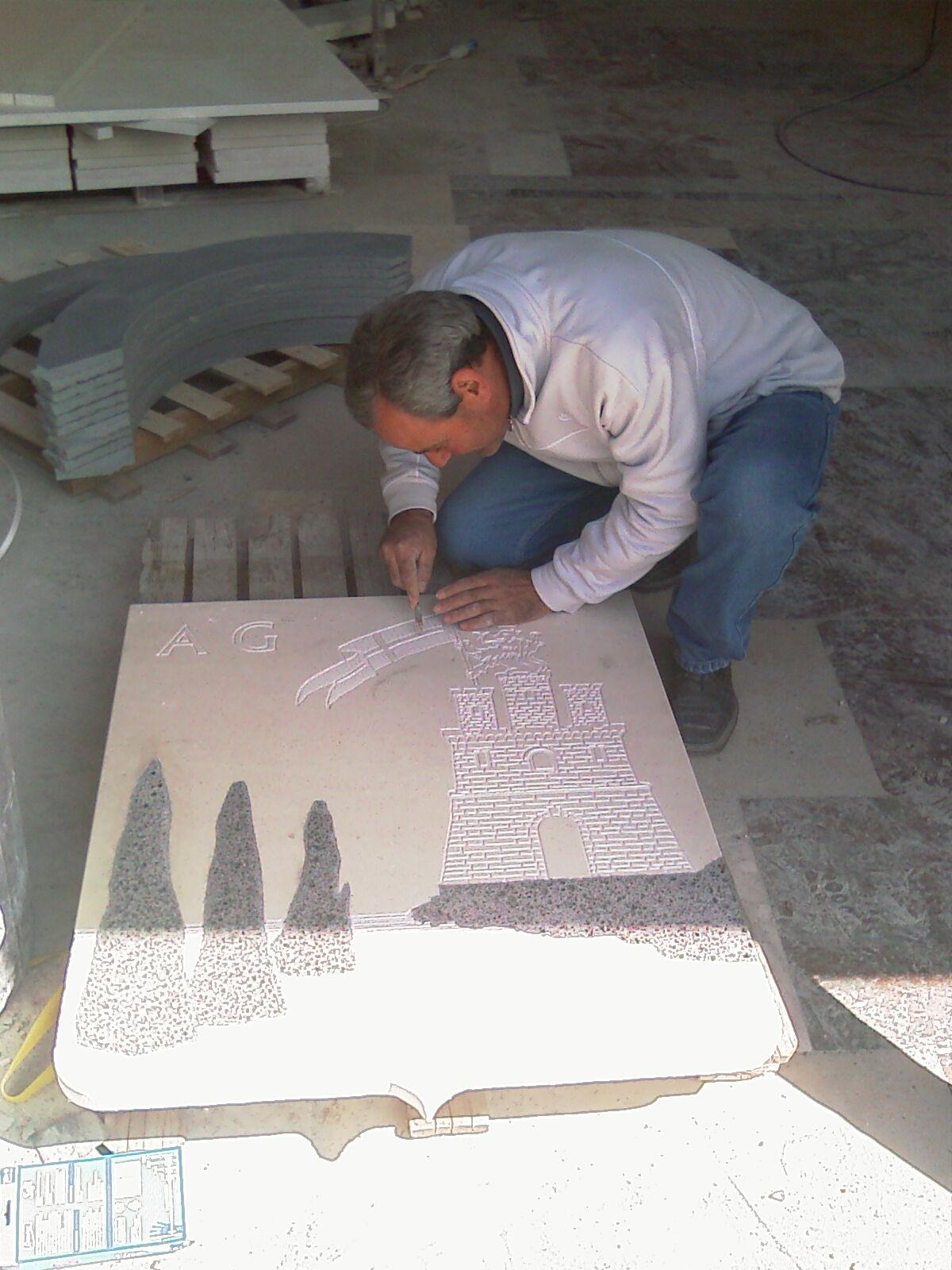 Lavorazione stemma centrale della piazza del Duomo di Acireale